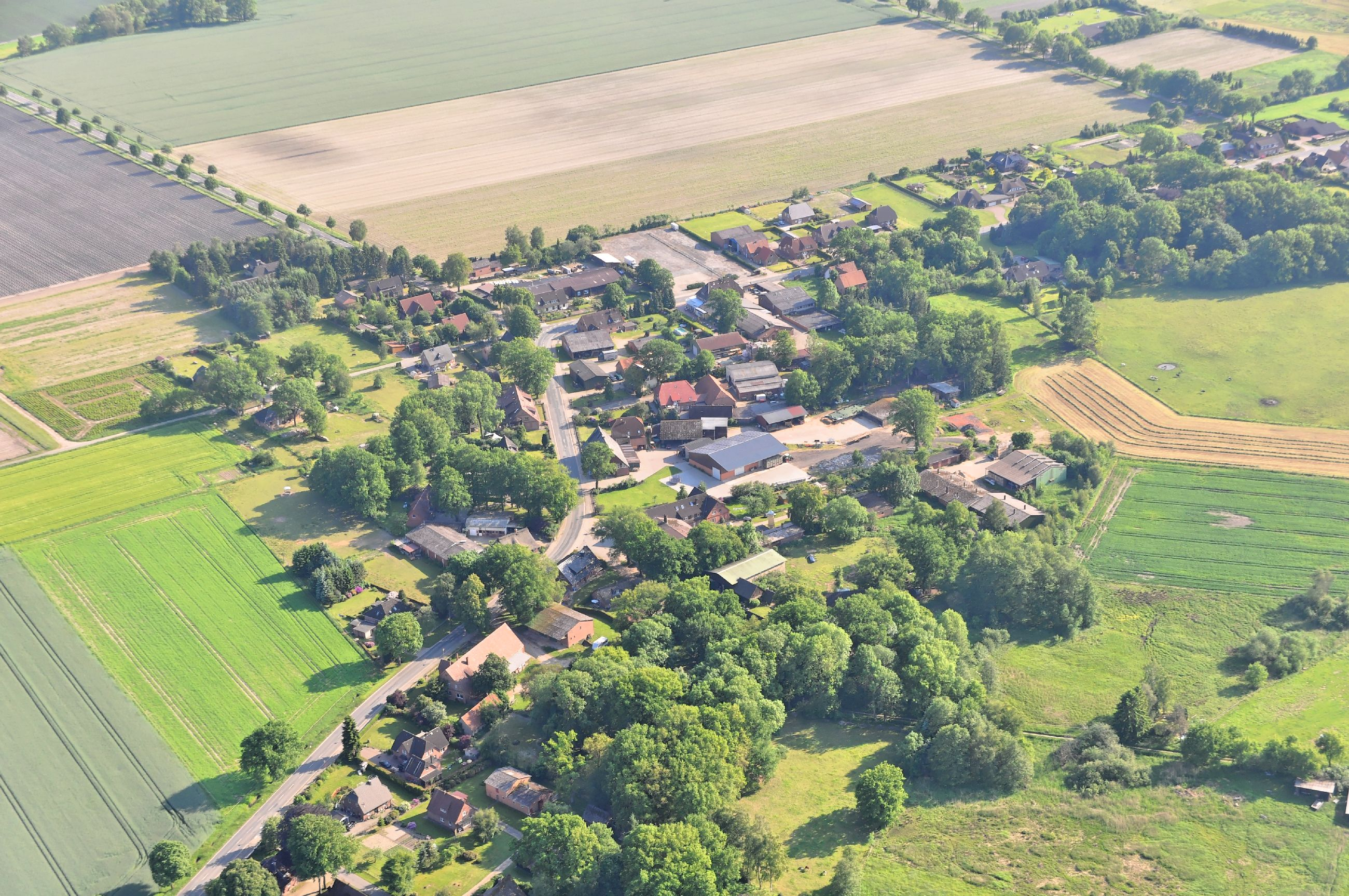 Überführungsflug vom Flugplatz Nordholz-Spieka über Lüneburg, Potsdam zum Flugplatz Schwarzheide-Schipkau